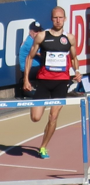 Joni Vainio-Kaila 400 metrin aitajuoksun loppukilpailun kahdeksannella aidalla Kalevan kisoissa 2020.